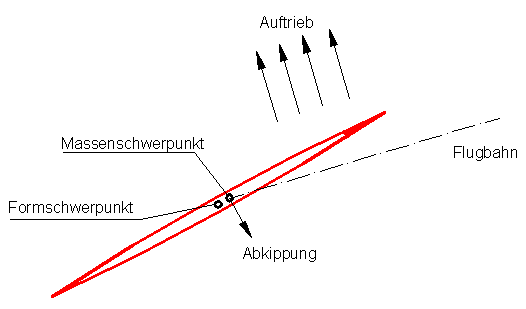 SpeerFlug - Aerodynamik